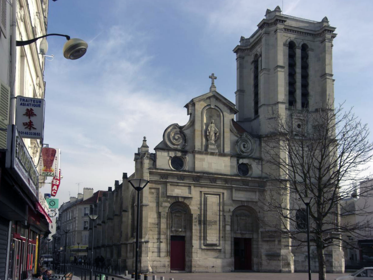 Vue de l'église Notre-Dame-des-Vertus à Aubervilliers, depuis la rue Charron. (février 2009)